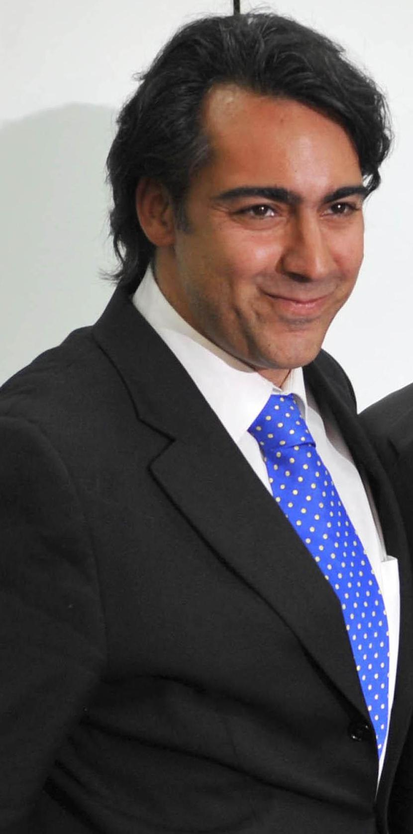 Marco Enríquez-Ominami en una visita al Presidente brasileño Lula Da Silva.